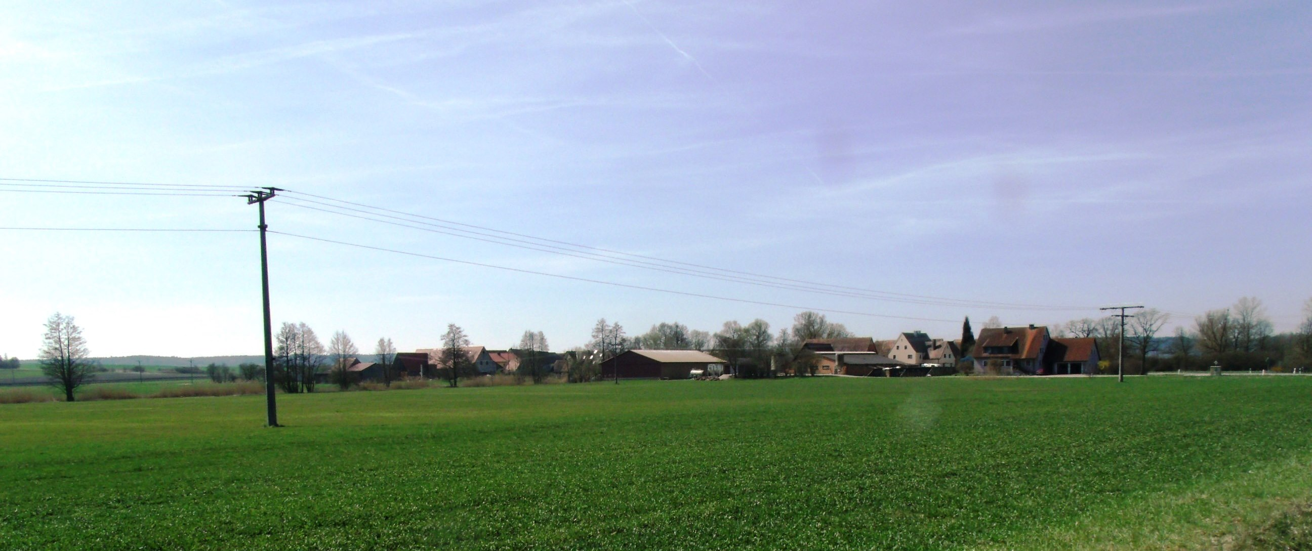 Erlbach, Ortsteil von Leutershausen im Landkreis Ansbach